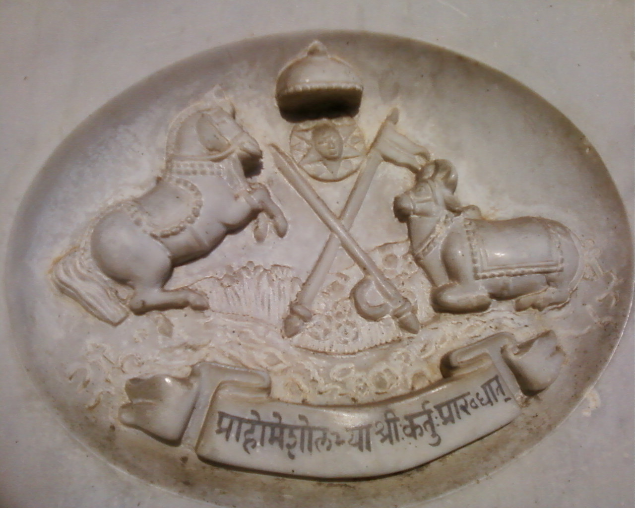 इंदूर संस्थान